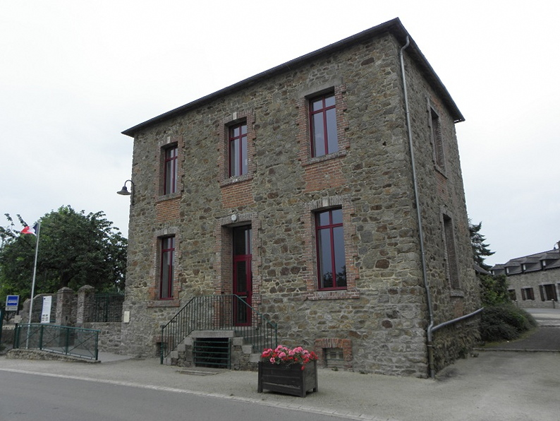 Mairie de Cardroc (35).